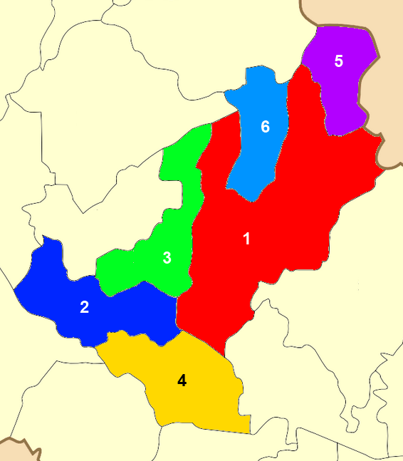 Χάρτης των ενοτήτων (και πρώην δήμων) από τις οποίες αποτελείται ο Δήμος Σερρών